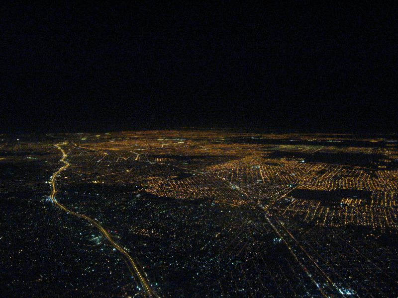 Vista aérea nocturna del oeste del Gran Buenos Aires, Argentina, tomada hacia el Este a unos 3000 metros de altura. En la parte inferior se observa Paso del Rey y en el centro la ciudad de Merlo. En el centro está la Ruta Provincial 7 y a la izquierda se observa el Acceso Oeste (autopista iluminada que forma parte de la Ruta Nacional 7). Donde termina la iluminación se encuentra el límite entre la Ciudad de Buenos Aires y la provincia del mismo nombre.